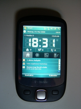 MDA-Touch